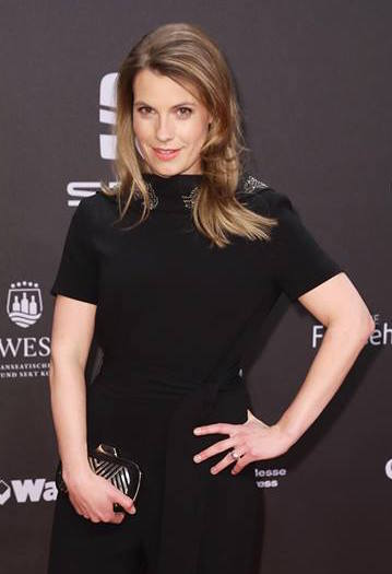 Nina Heinrichs als Moderatorin auf der Goldenen Kamera 2017